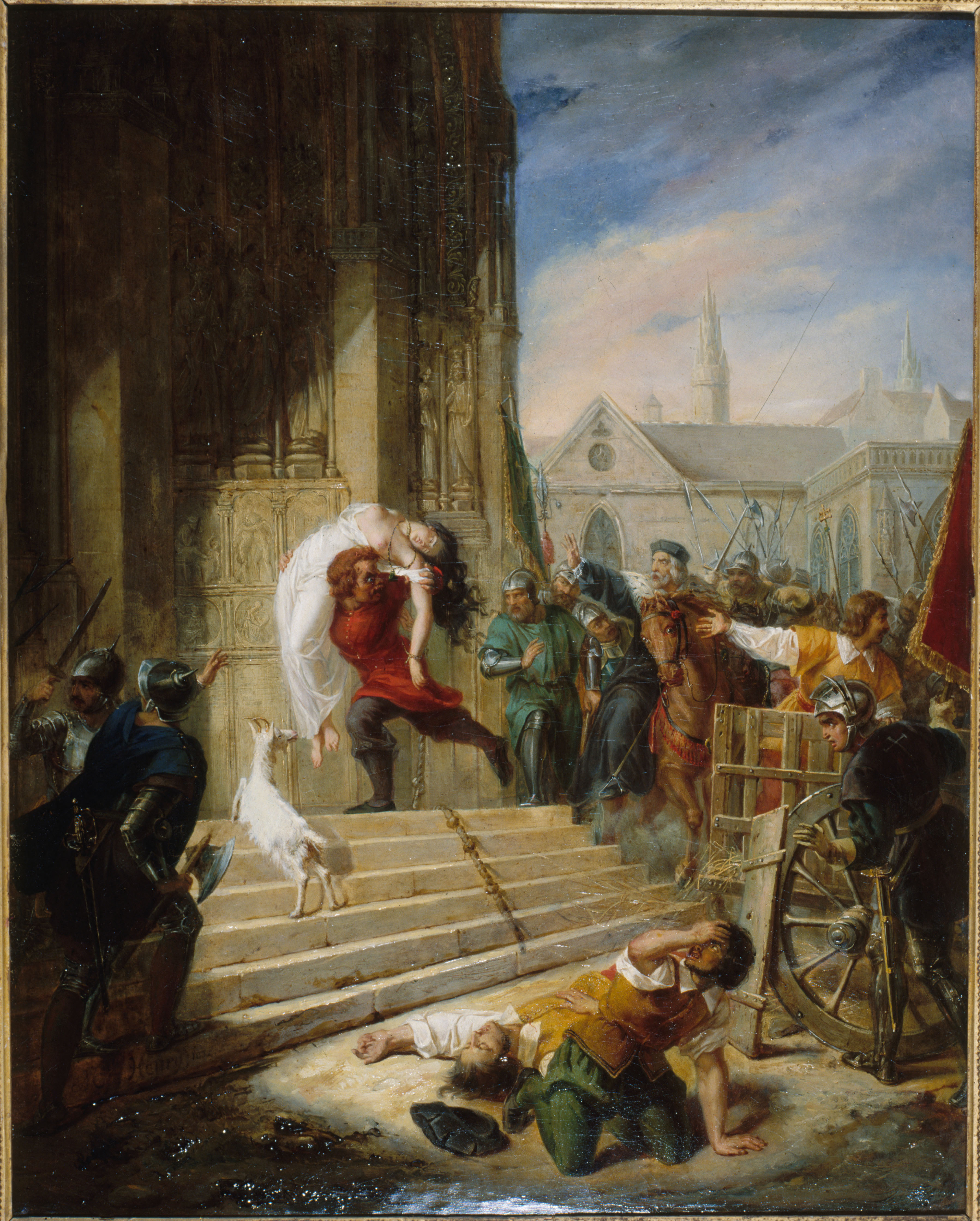 Quasimodo sauvant la Esmeralda des mains de ses bourreaux, illustrant un épisode de Notre-Dame de Paris de Victor Hugo.